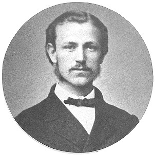 Foto von Heinrich Büssing